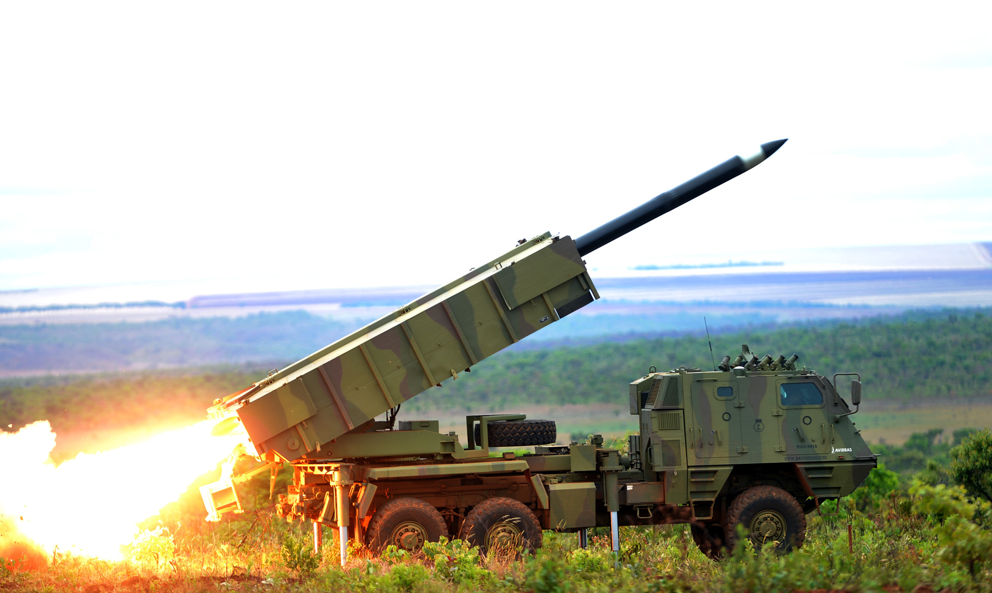 29/10/2014, Formosa - GO Fotos: Tereza Sobreira